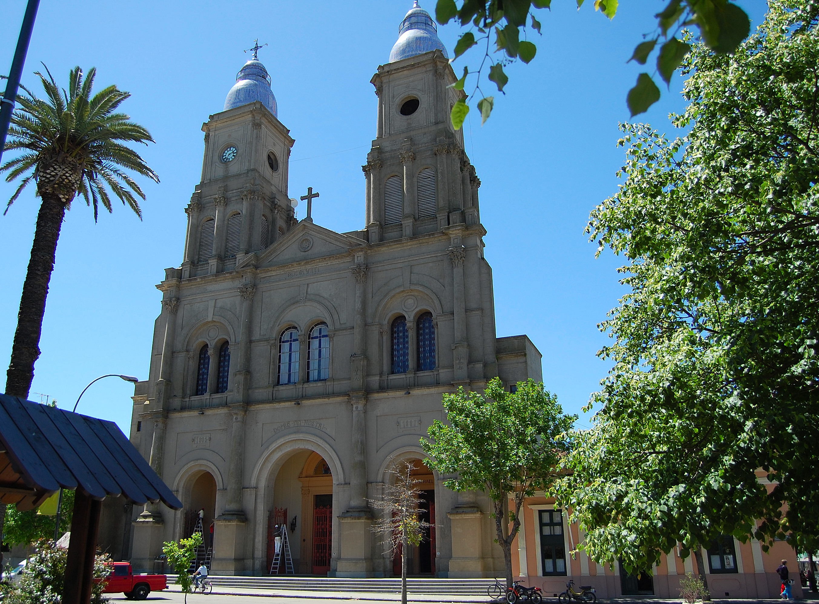 Se trata de la Catedral de la ciudad de Florida, capital del departamento del mismo nombre, ubicada en la Plaza Asamblea